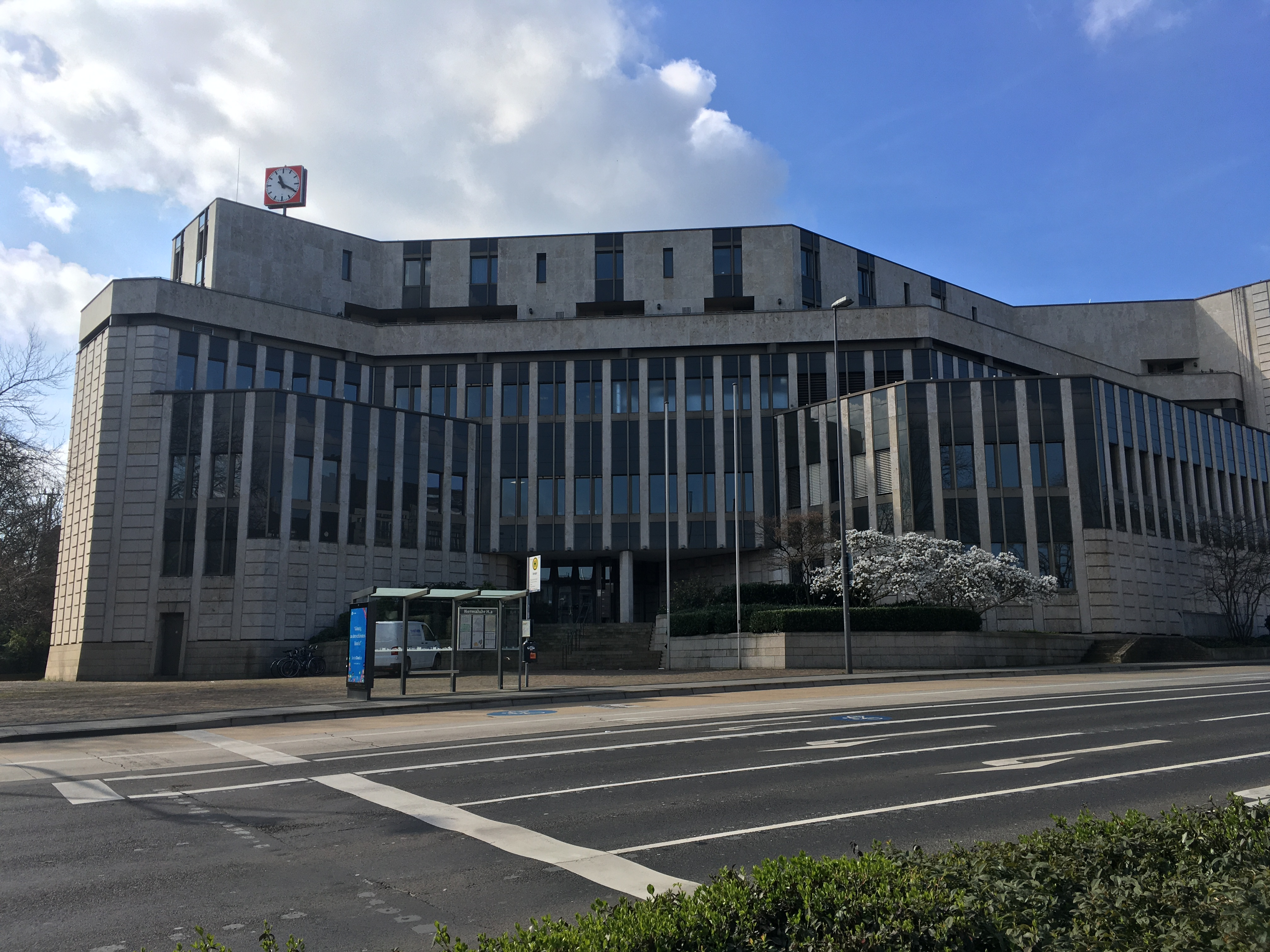 Blick von vorn auf die ehemaligen LZB Aachen. Seit 2012 Niederlassung der Sparkasse Aachen